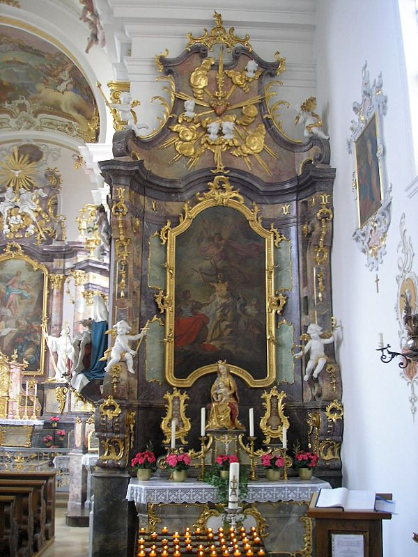 Kloster Oberschönenfeld bei Augsburg (Bayerisch-Schwaben). Altar im rechten Querarm der Kirche. Eigene Aufnahme, Sept. 2006 / Oberschoenenfeld Monastery near Augsburg (Bavaria, Germany). Abbey church. One of the altars at the right side of the nave. Own photo, Sept. 2006